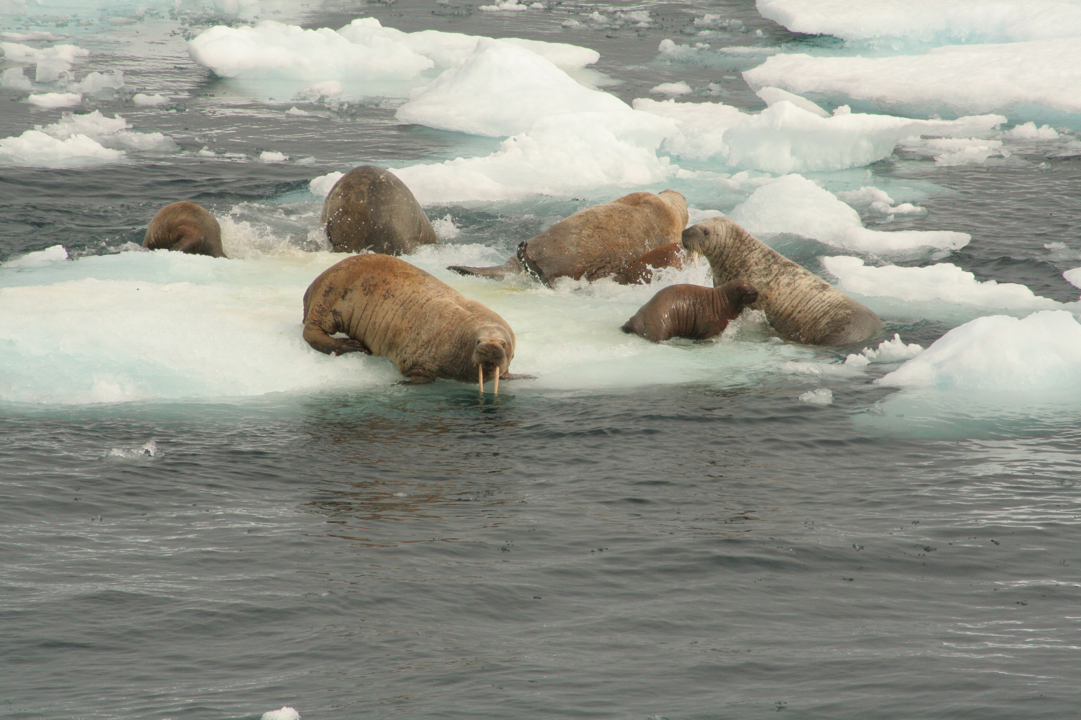 Walrus entering water